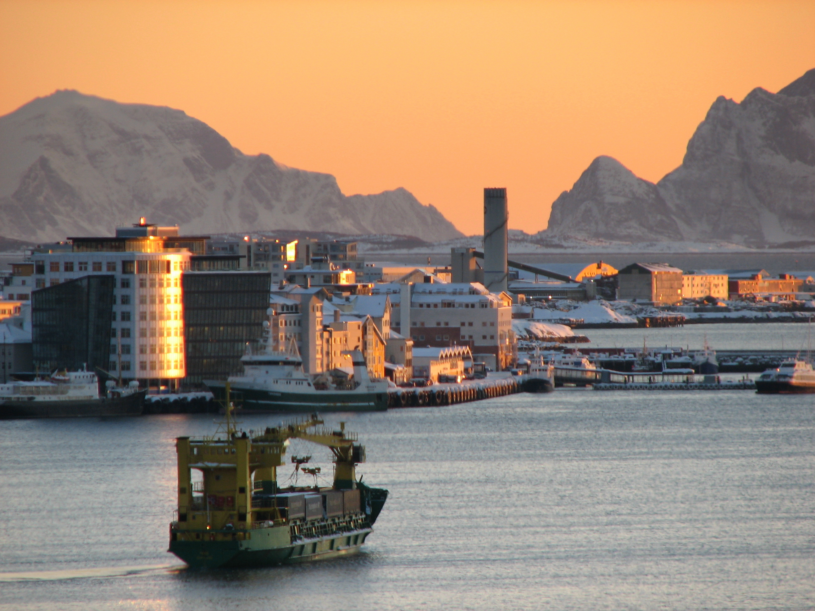 M/S Tege i Bodø havn